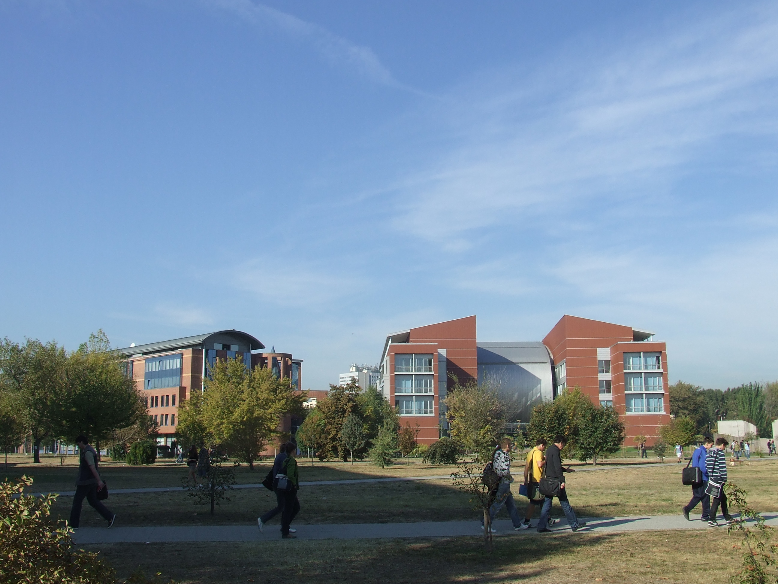 BME, I és Q épület